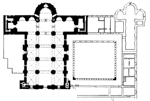 plànol de la Catedral de la Seu d'Urgell, claustres i església de Sant Miquel